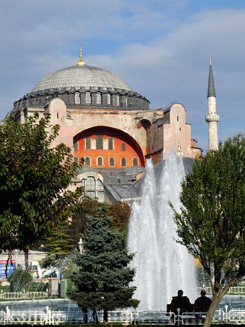 Aya Sofya